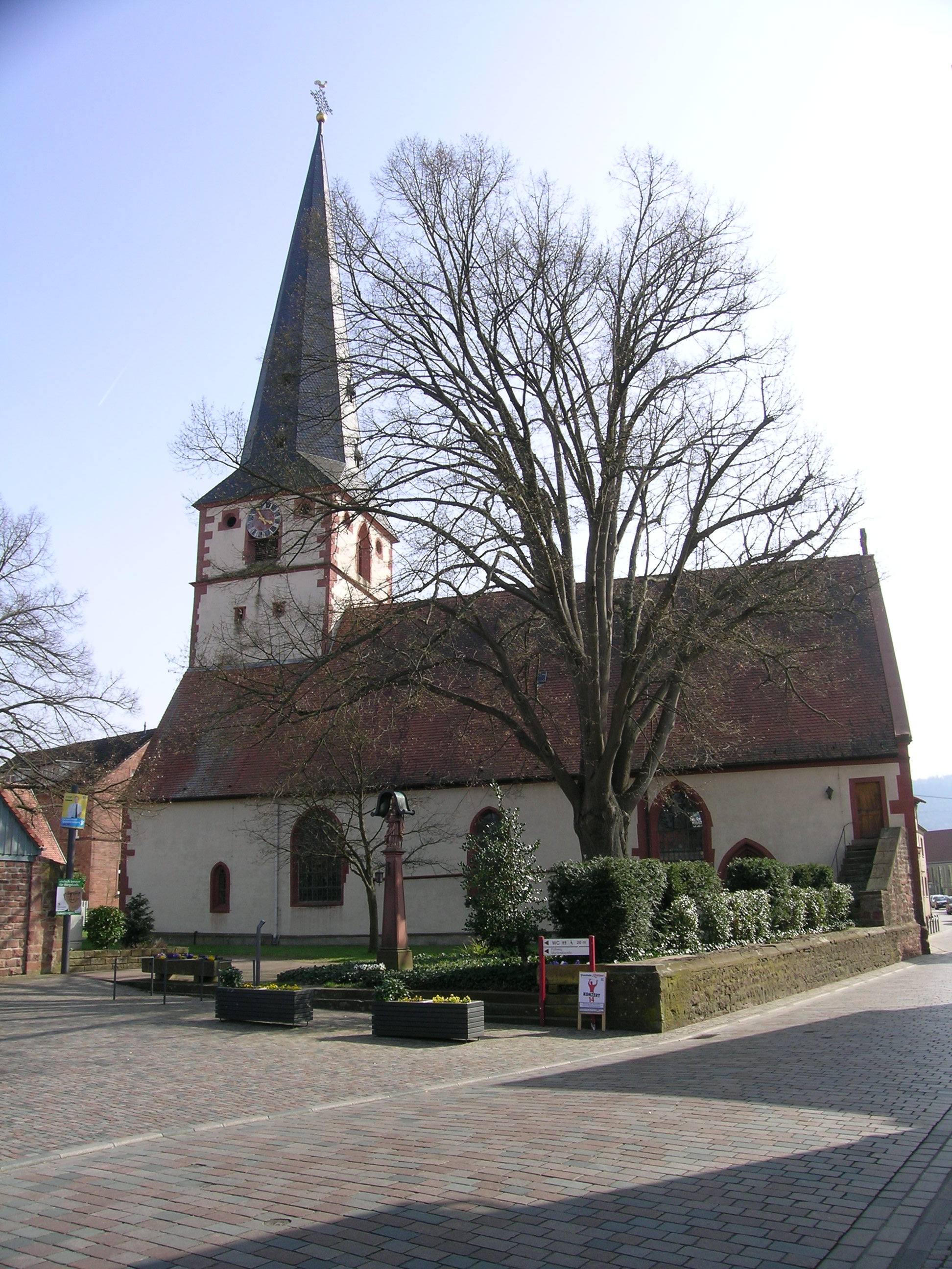 Alte Pfarrkirche in Bürgstadt